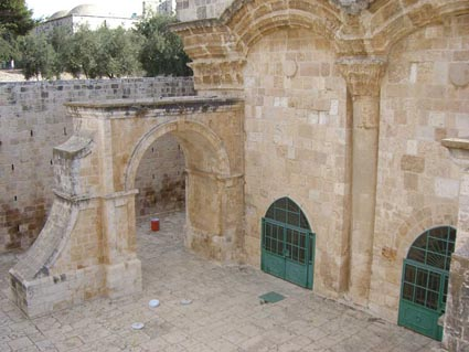 Gold_gate